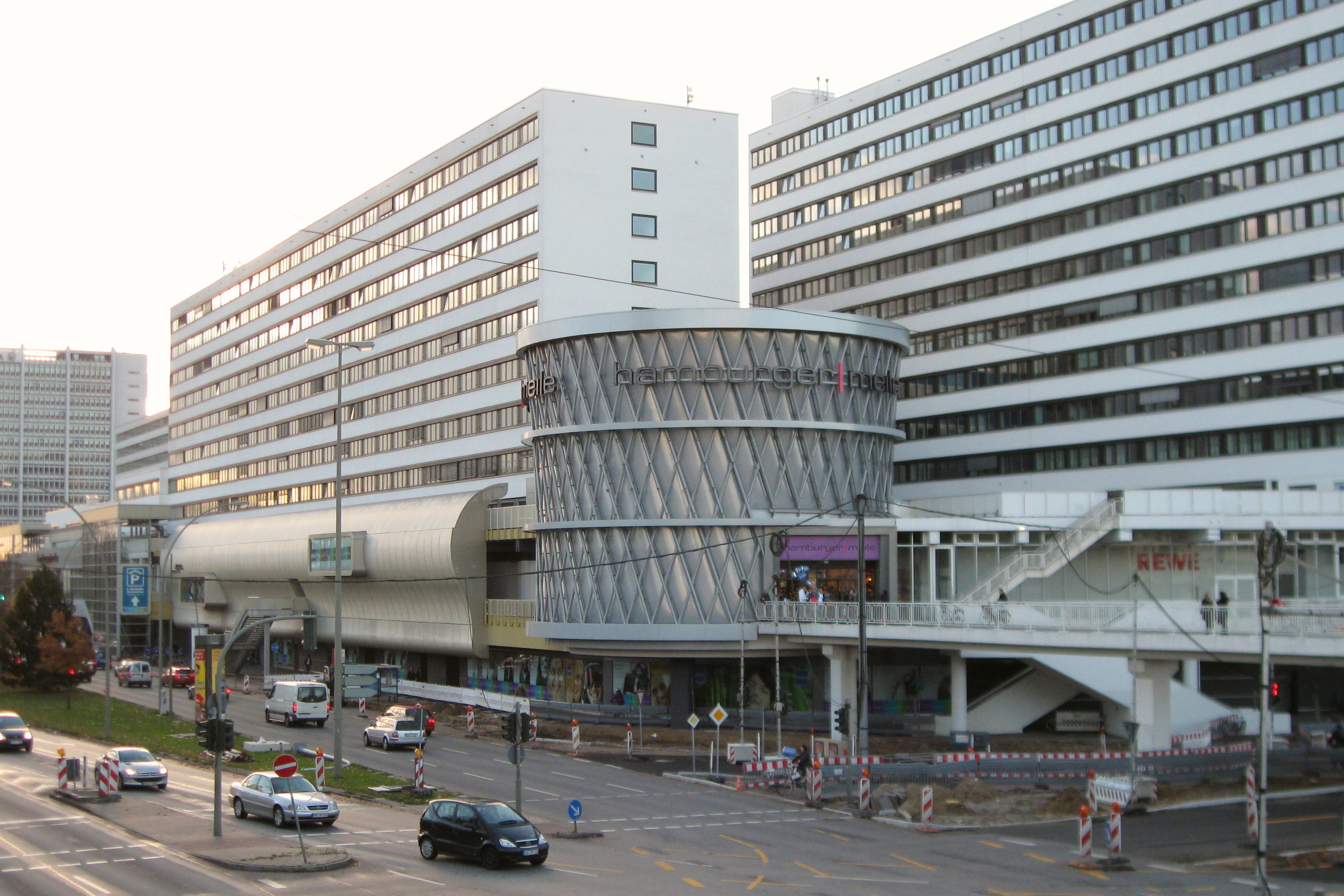 Hamburg: Hamburger Meile (Einkaufszentrum Hamburger Straße) mit Brücke vom U-Bahnhof "Hamburger Straße".